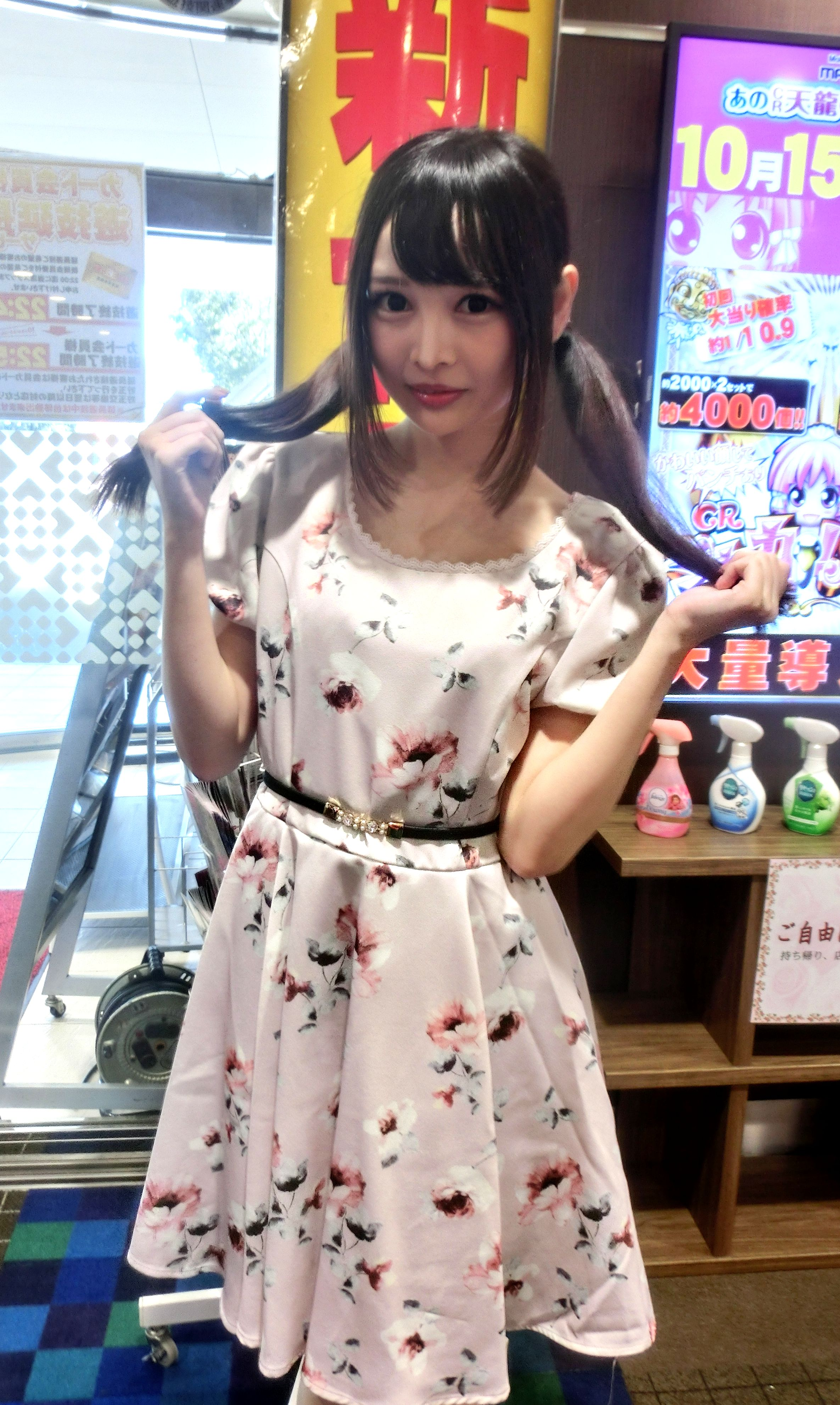 西東京市・田無ファミリーランド(2018年10月1日)跡美しゅり